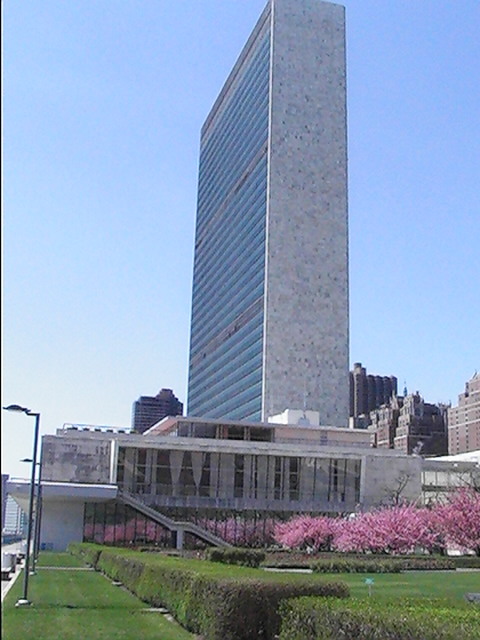 Siège New Yorkais de l'Organisation des Nations Unies